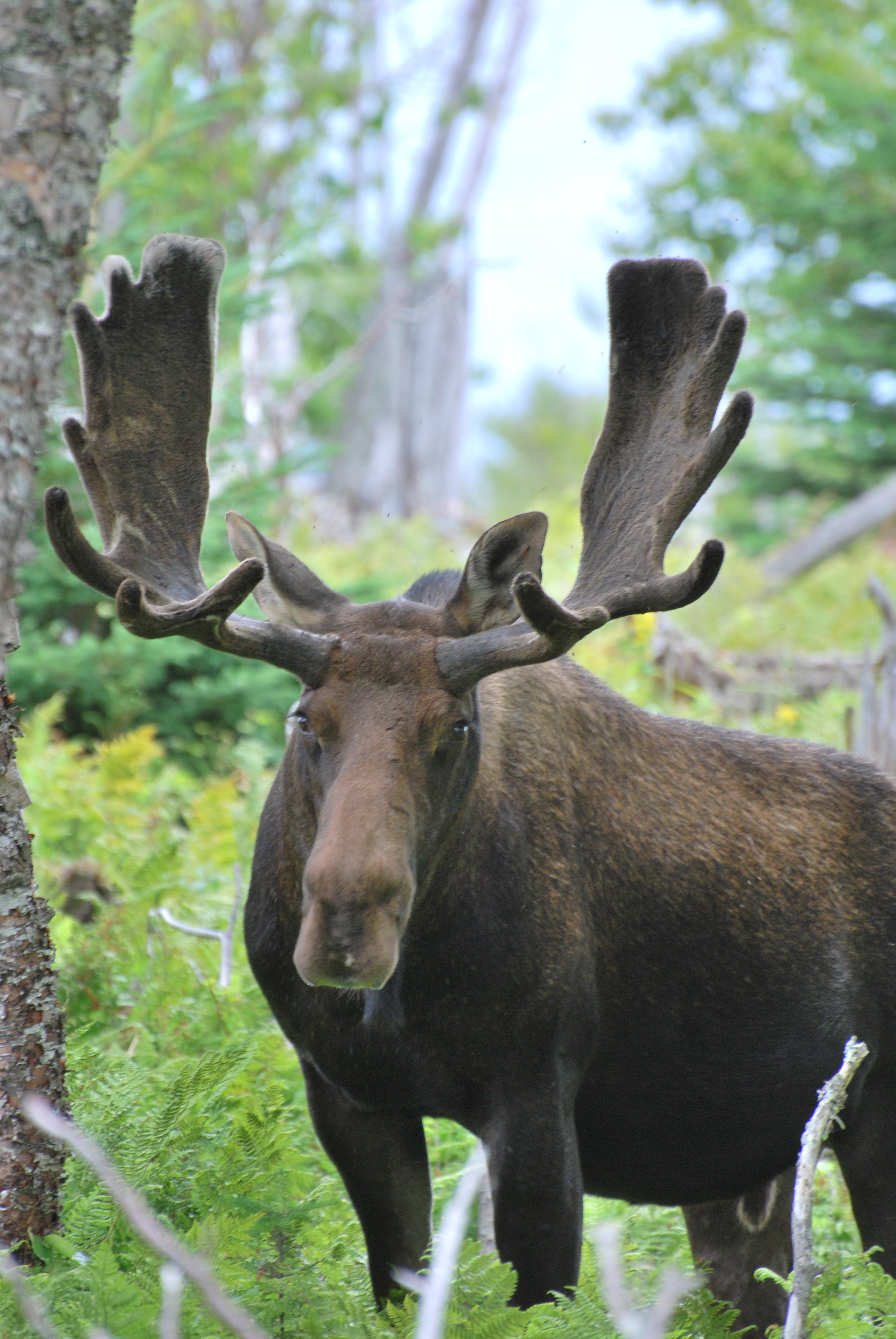 Orignal (élan), parc national Gros-Morne, Terre-Neuve. Moose, Gros-Morne National Park, Newfoundland.